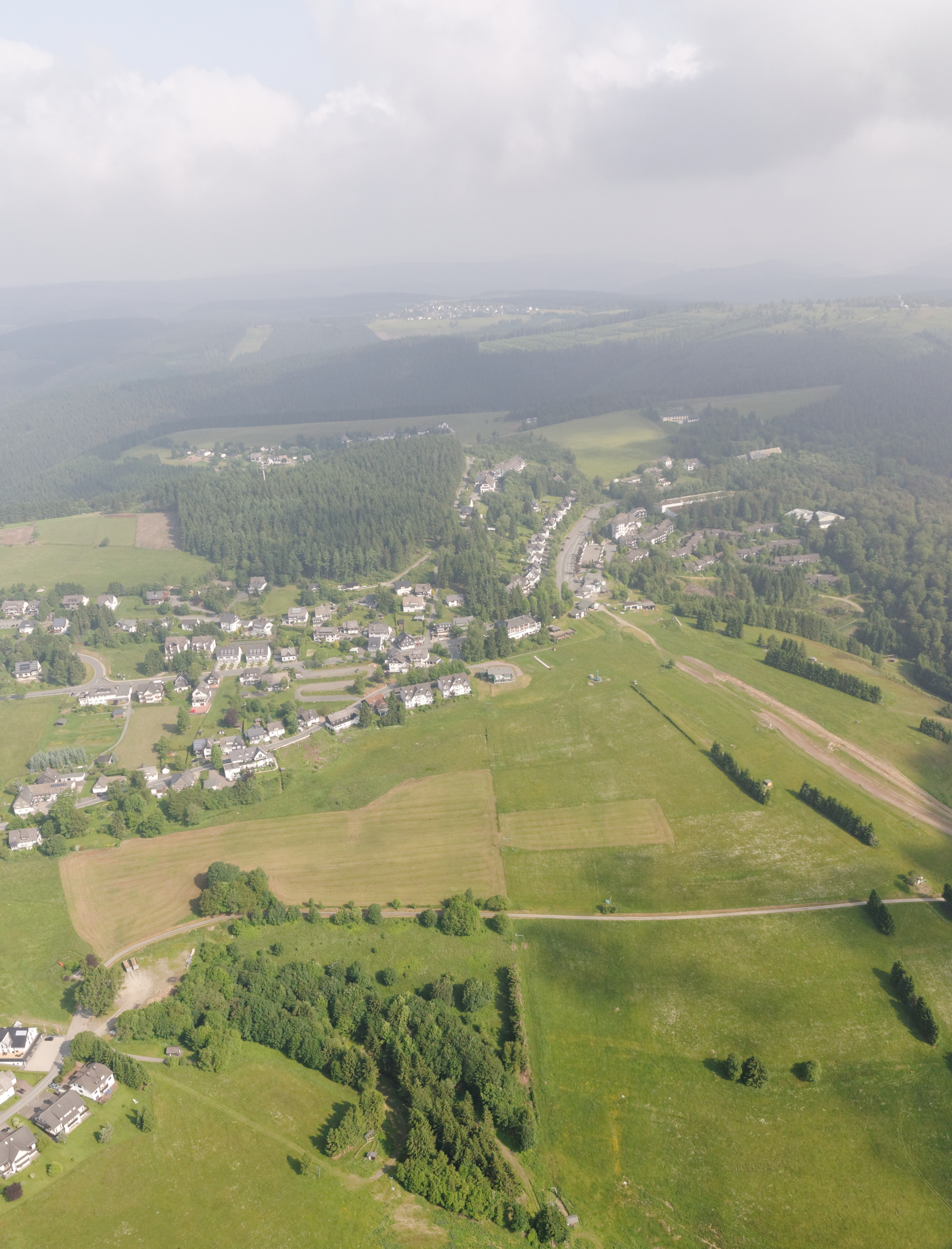 Fotoflug Sauerland-Ost, Winterberg-Neuastenberg, Postwiesen-Skigebiet bzw. Landschaftsschutzgebiet Postwiese und Magergrünland bei Neuastenberg